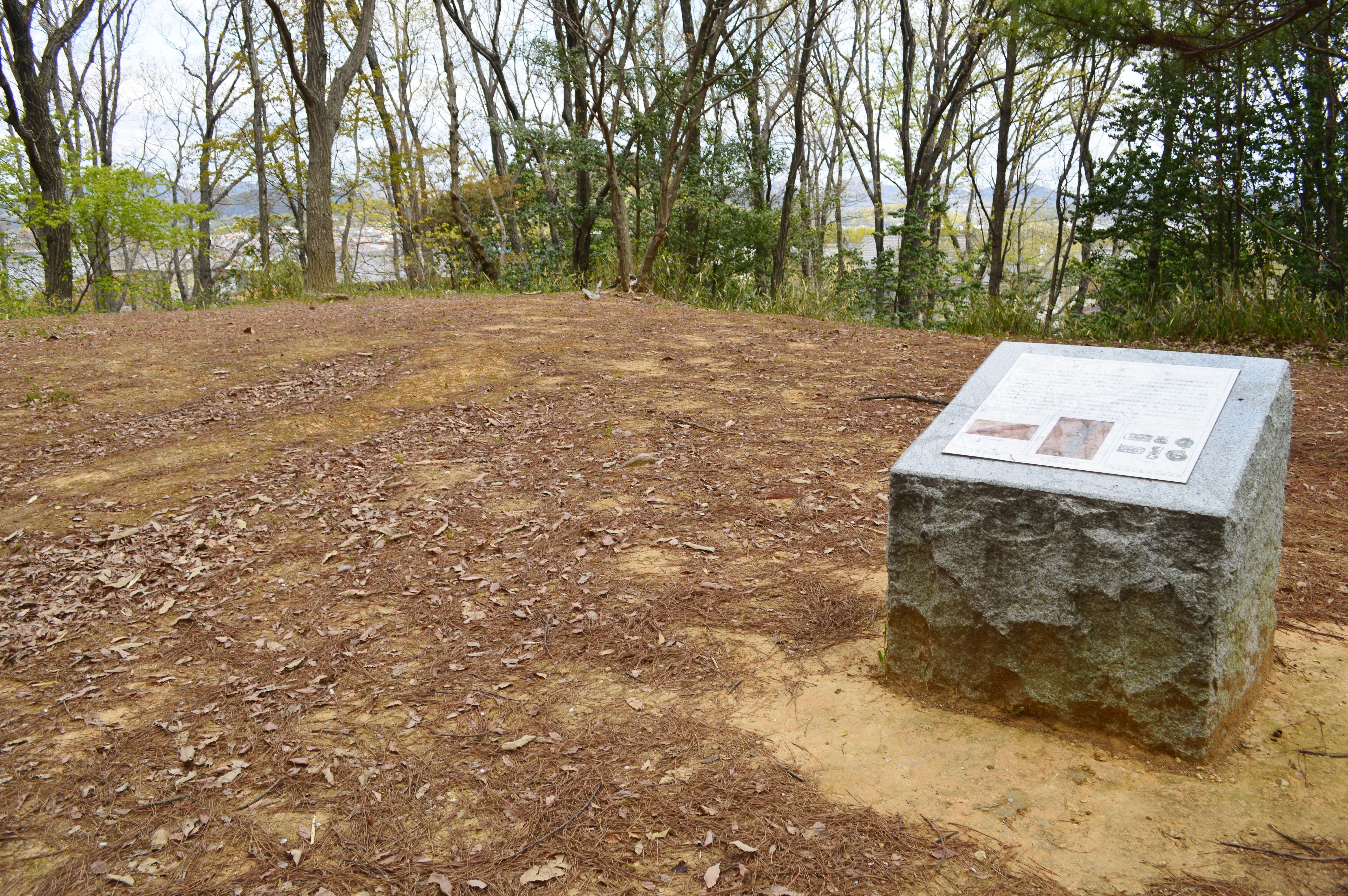 行者塚古墳 後円部墳頂